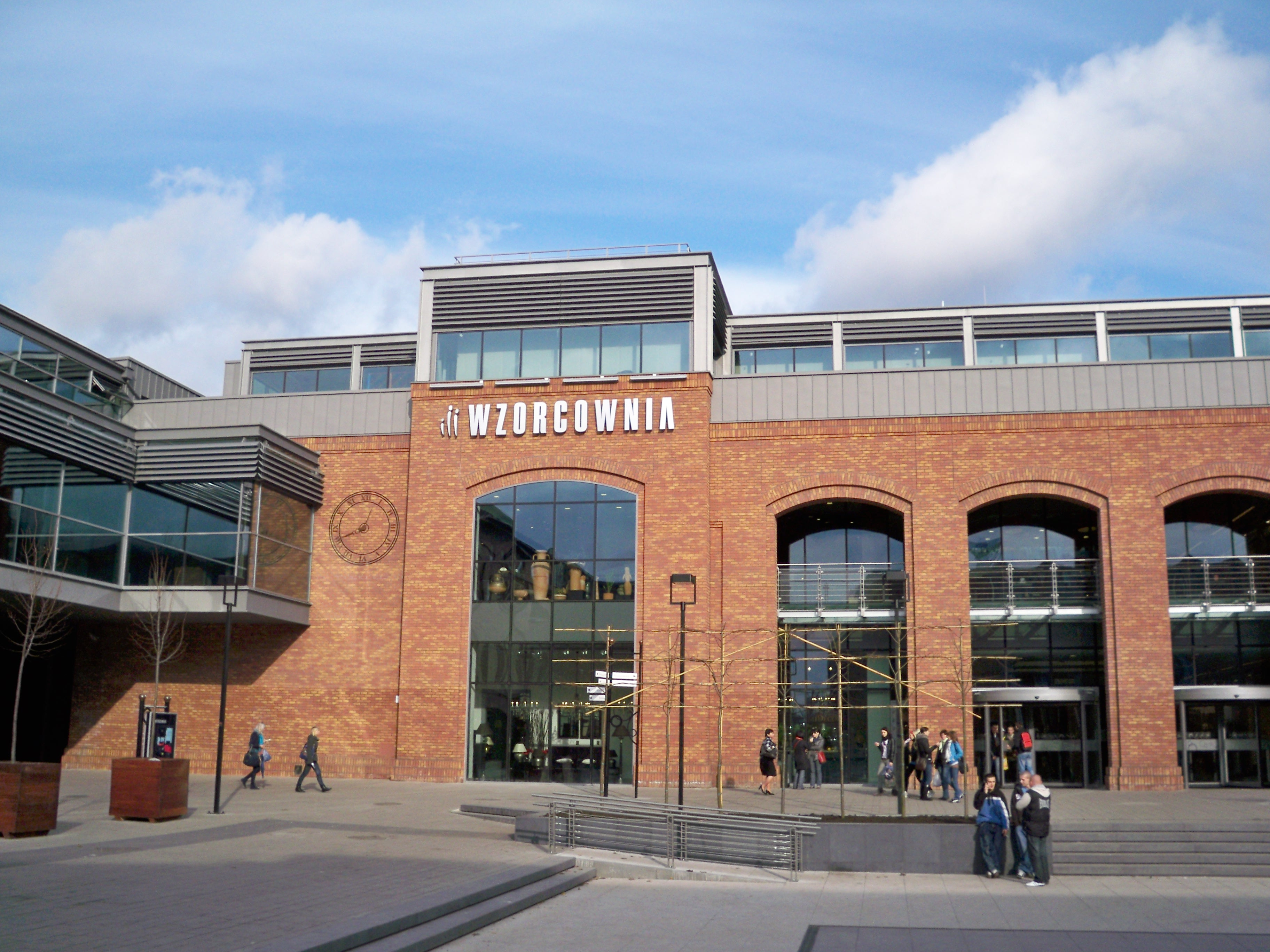 Wzorcownia Włocławek 2009